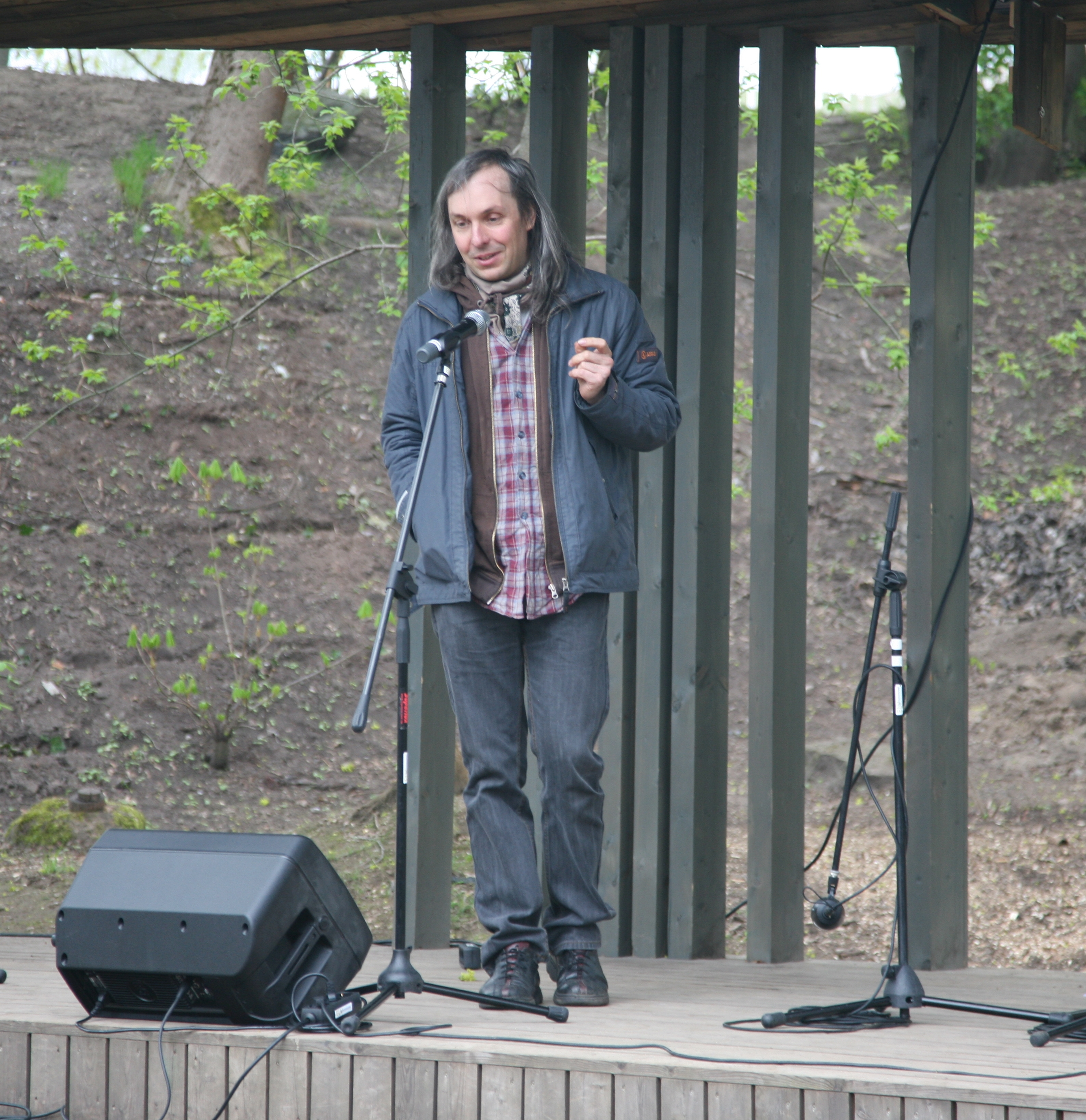 Lauri Sommer Prima Vista 2015 avamisel